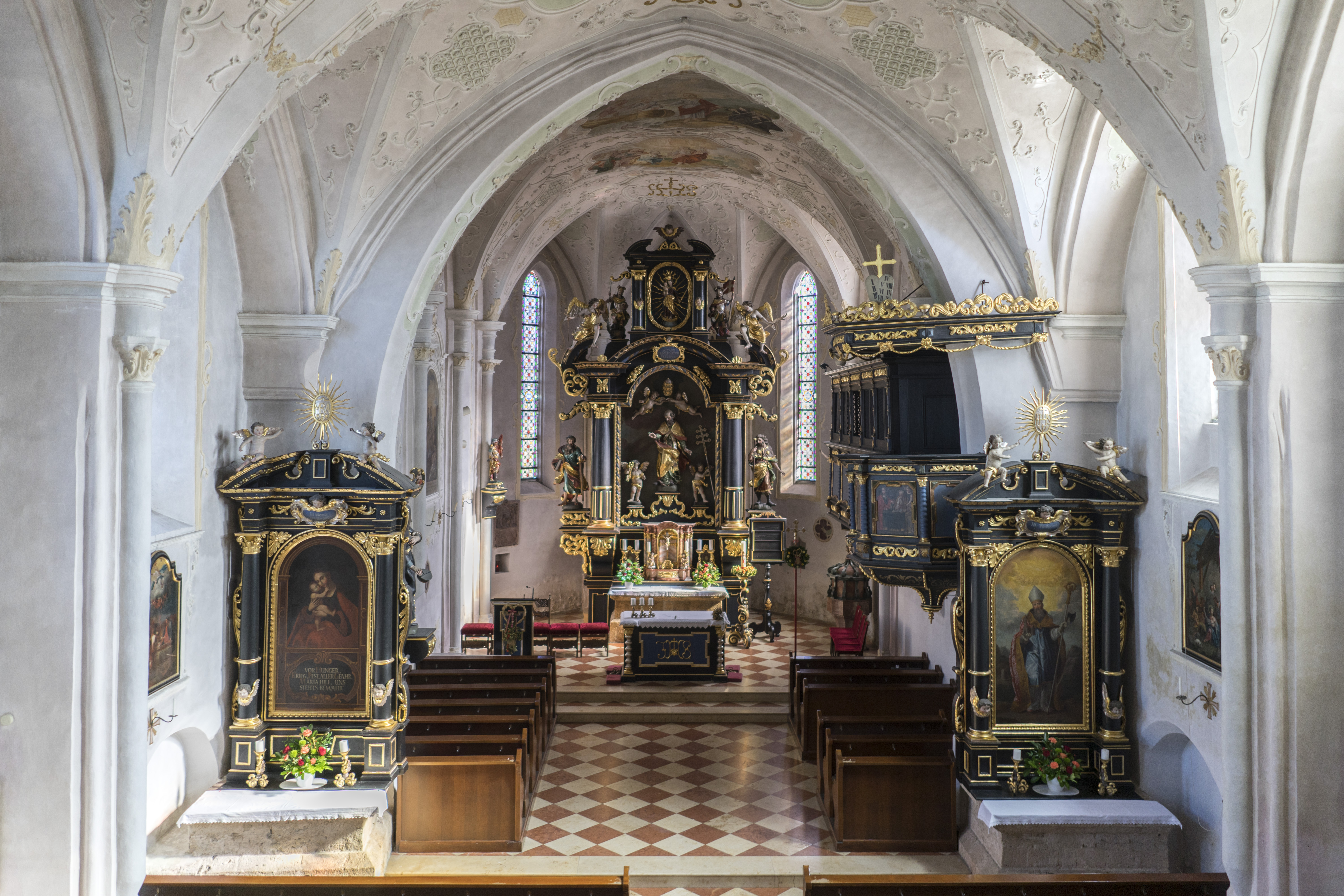 Kath. Pfarrkirche und Friedhof